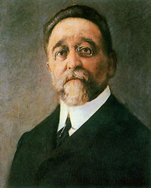 Retrato de Ruperto Chapí